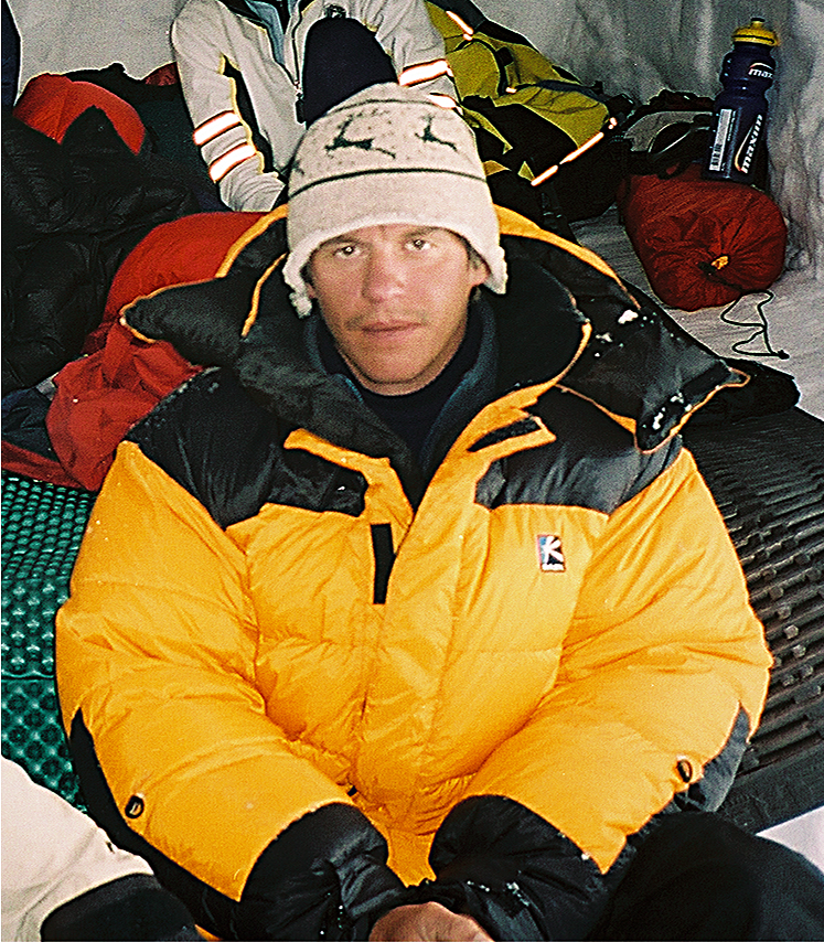 Priit Joosu